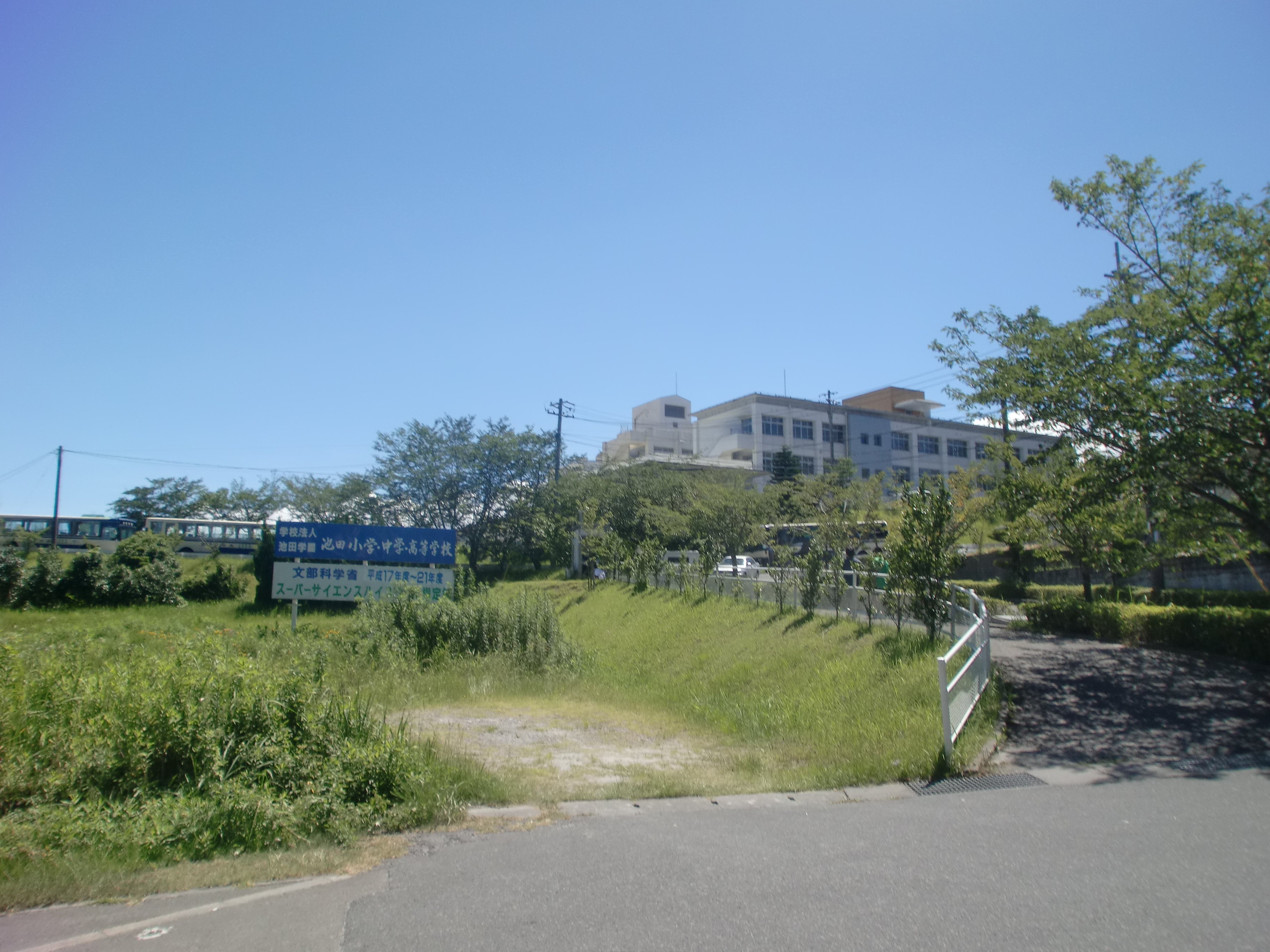 池田学園池田中学・高等学校、池田学園池田小学校